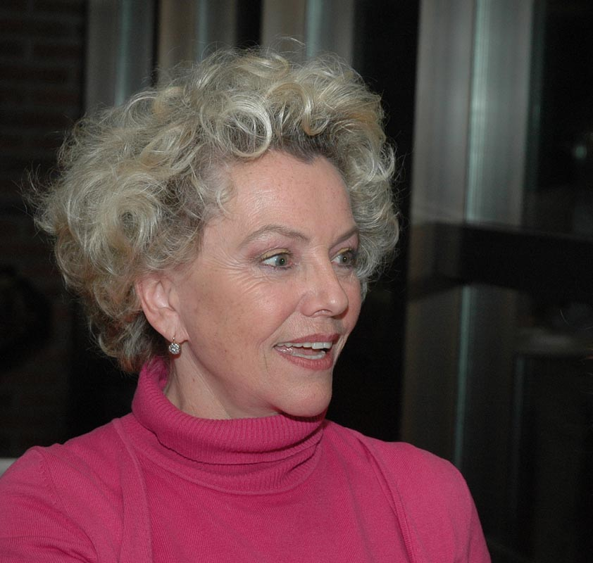 Veronika-Marie von Quast auf einem Künstlerempfang im Münchner Gasteig 2005